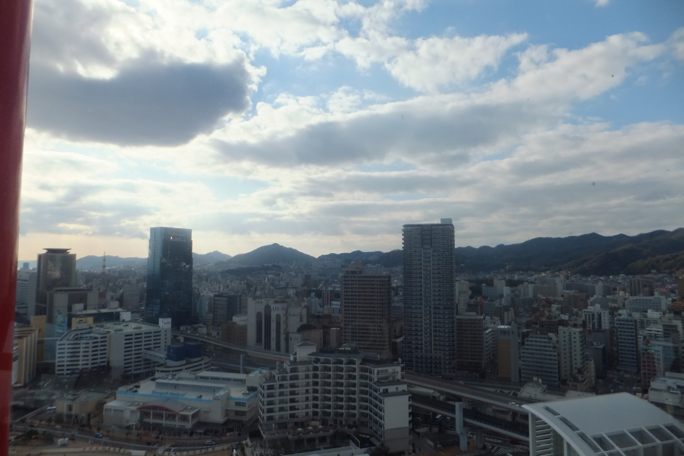 兵庫県県神戸市兵庫区の市街地